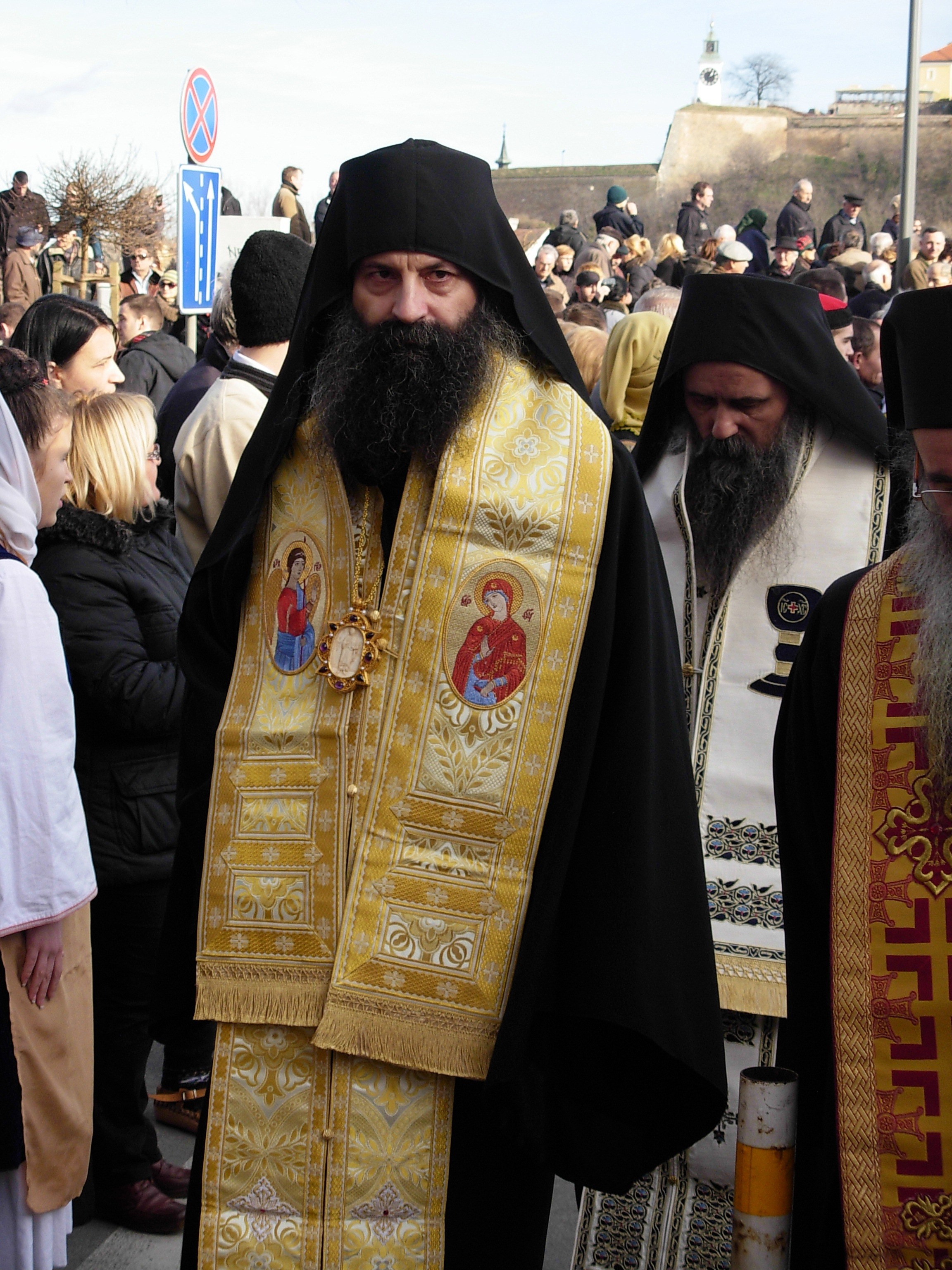 Predstavnici SPC na obeležavanju 70. godišnjice Novosadske racije.